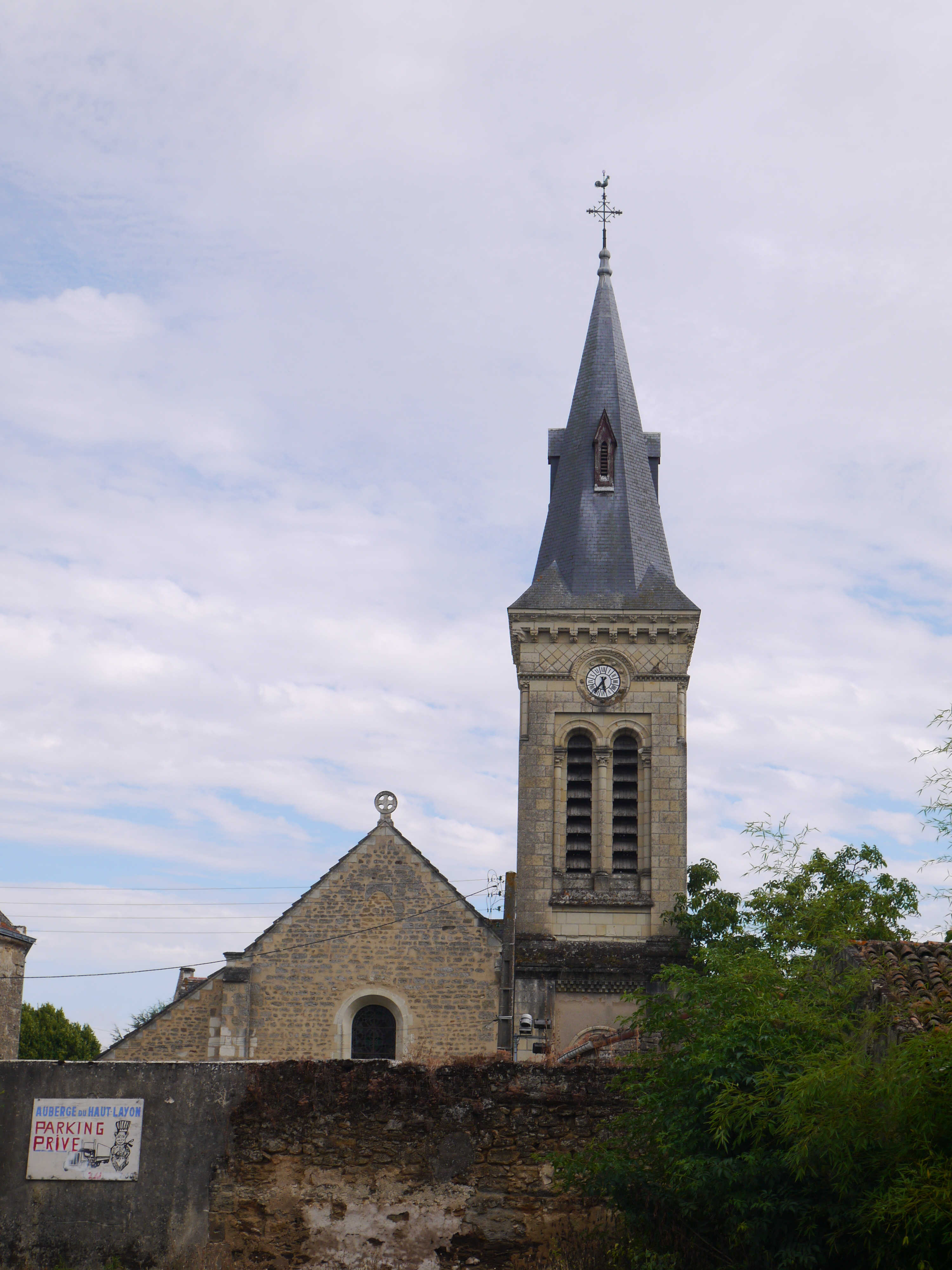 L'église Saint-Hilaire.